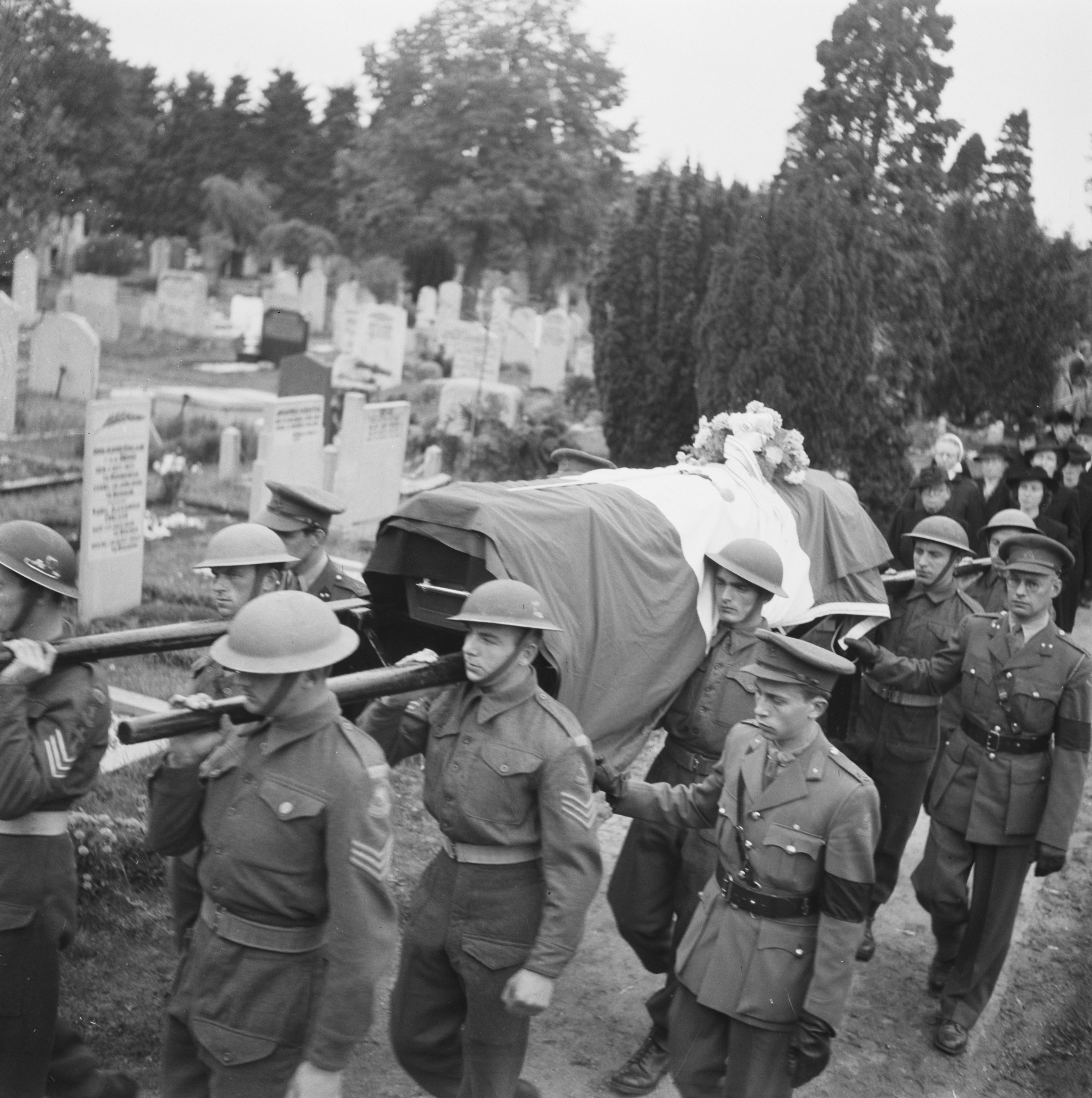 Collectie / Archief : Fotocollectie Anefo Reportage / Serie : Begrafenis van Lange Jan van Bussum Beschrijving : Jan Thijssen bijgenaamd "Lange Jan" , in leven leider van de radioafdeling Nederlandse Binnenlandse strijdkrachten, met militaire eer te Loenen begraven. Datum : 1945 Locatie : Loenen (Veluwe), Nederland Trefwoorden : begrafenissen, verzetsstrijders Fotograaf : Fotograaf Onbekend / Anefo Auteursrechthebbende : Nationaal Archief Materiaalsoort : Negatief (zwart/wit) Nummer archiefinventaris : bekijk toegang 2.24.01.03 Bestanddeelnummer : 900-7742